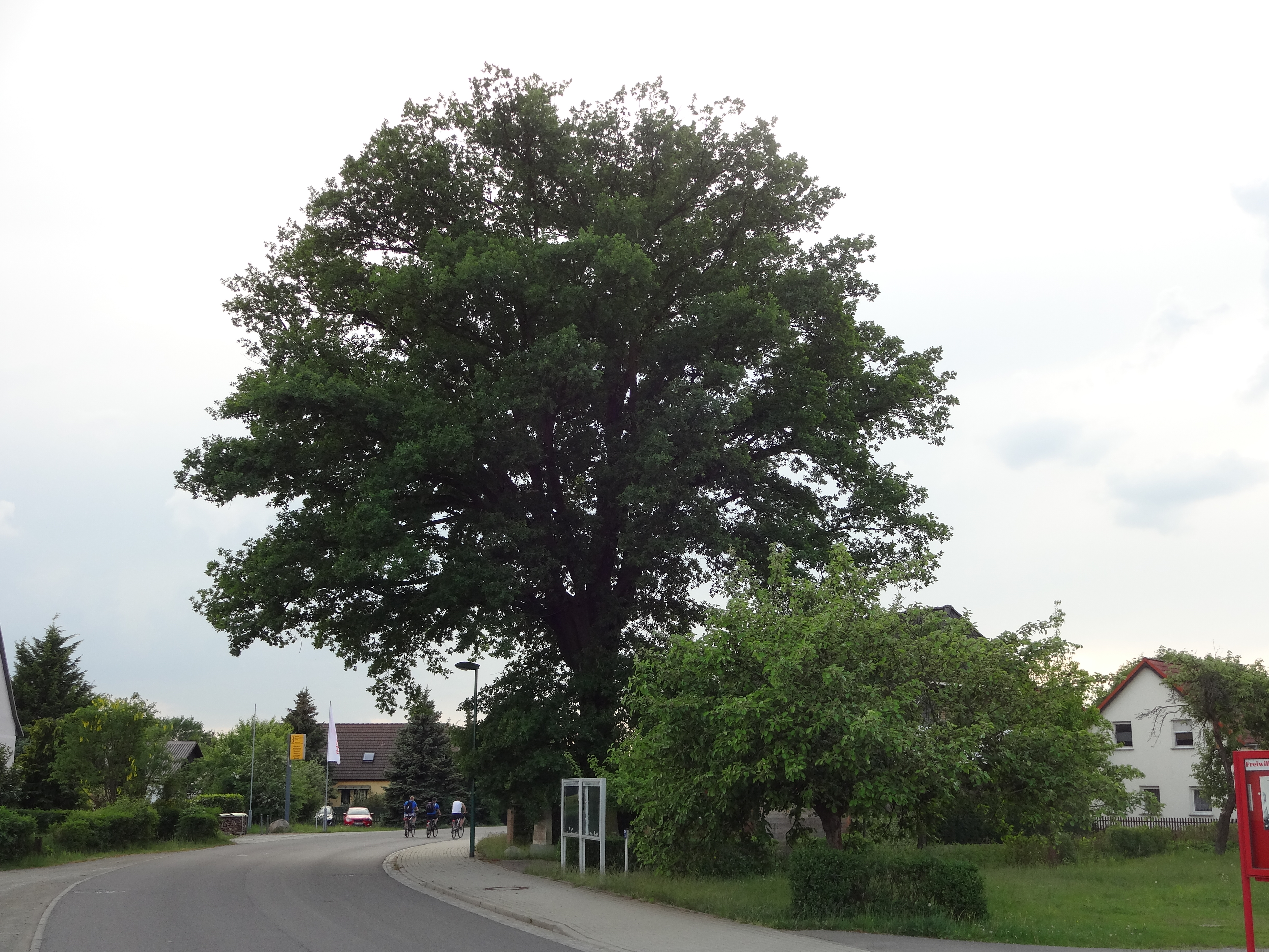 als Naturdenkmal geschützte Stieleiche in Kleinkoschen an der Kurve am Feuerwehrdepot